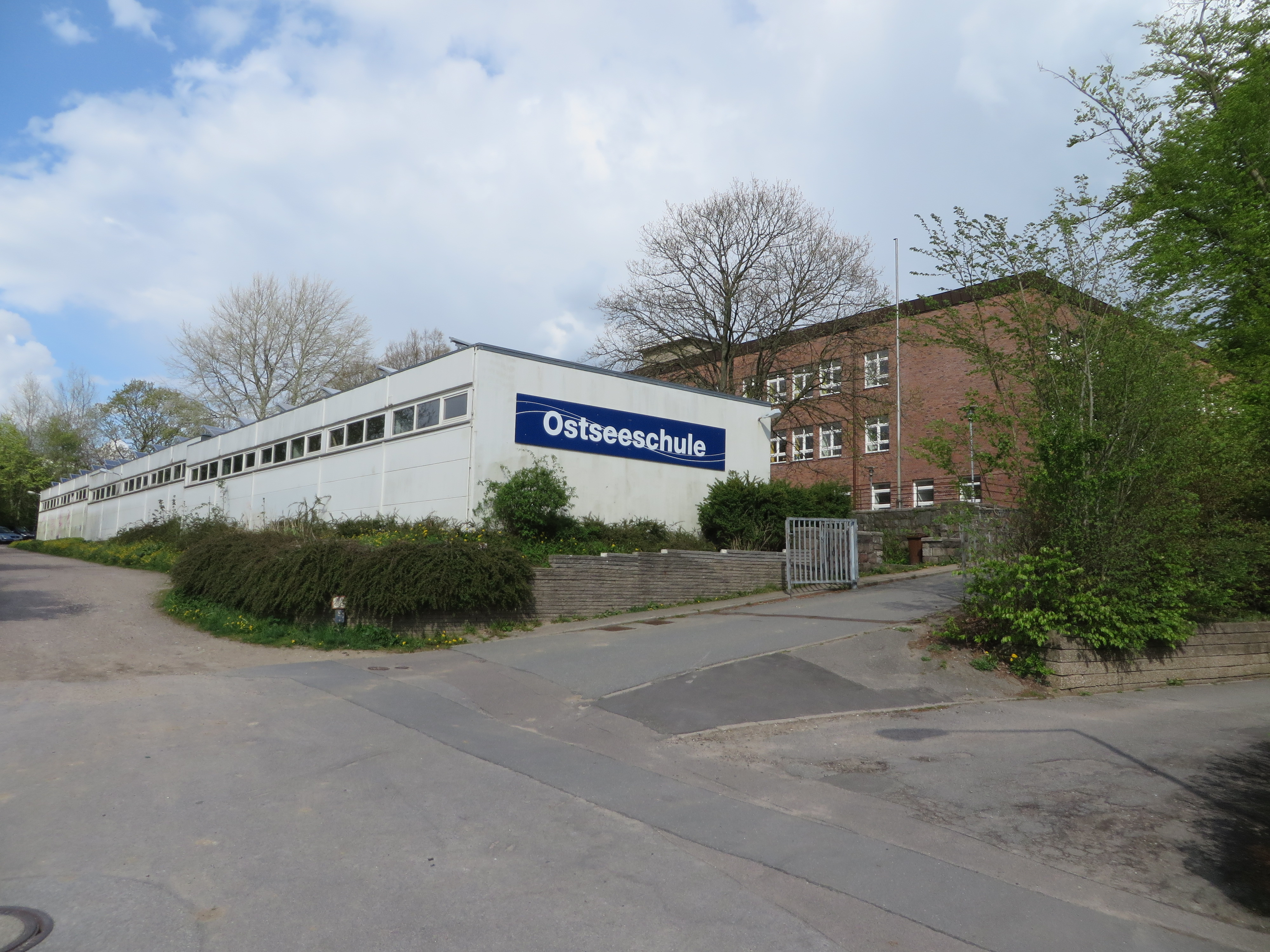 Ostseeschule bzw Osbekschule (Flensburg 2015), Bild 01